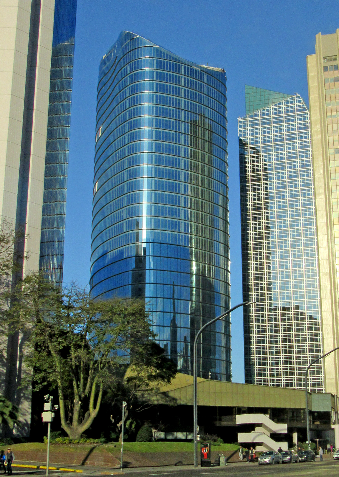 Sede Corporativa del Banco Macro, ubicada en el complejo Catalinas Norte, en la ciudad de Buenos Aires.